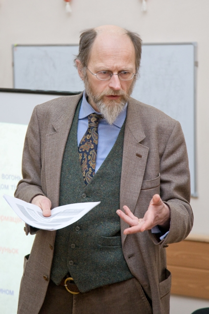 Виступ у Державному ВНЗ "Національний гірничий університет"